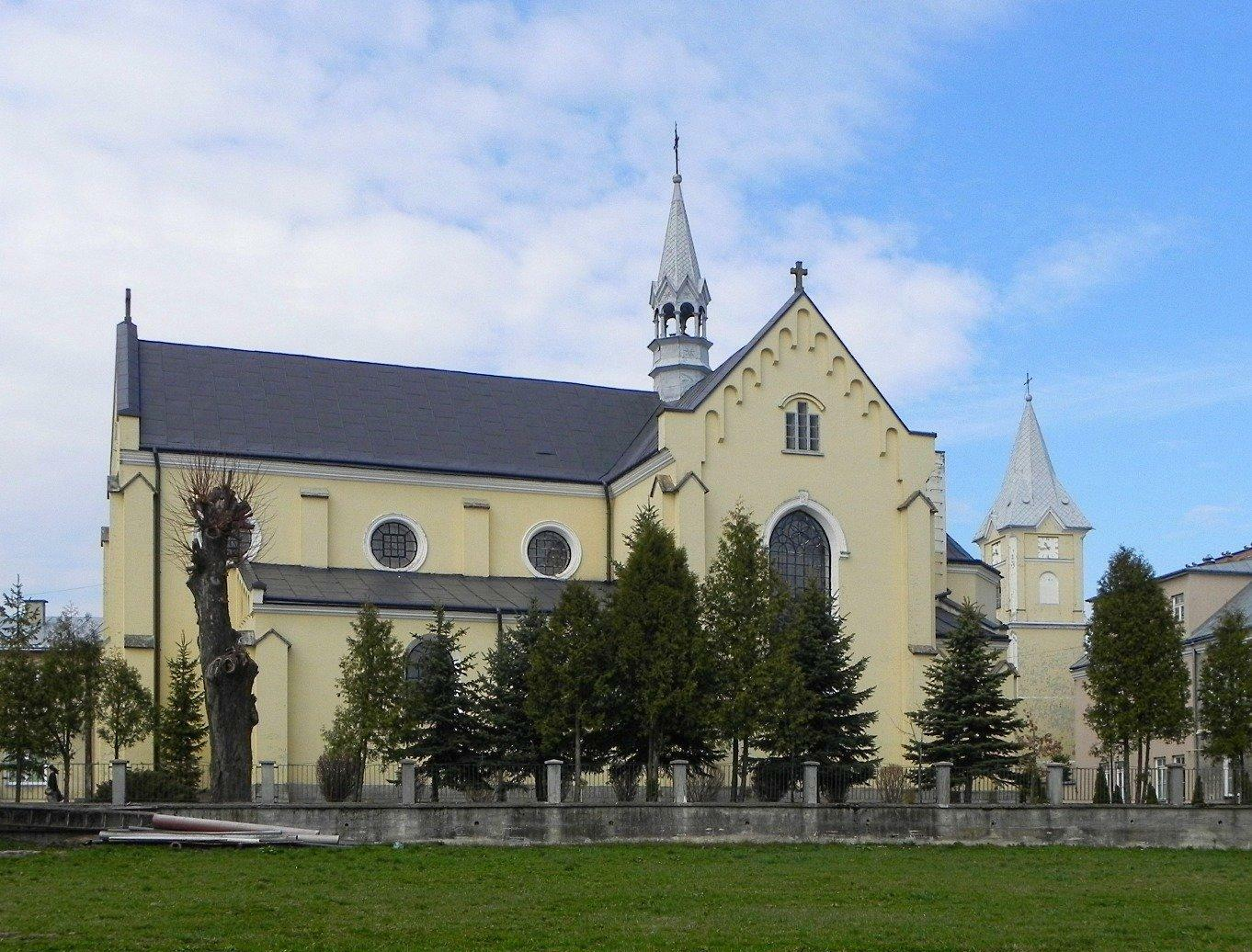 Kościół p.w. Narodzenia NMP w Oleszycach.